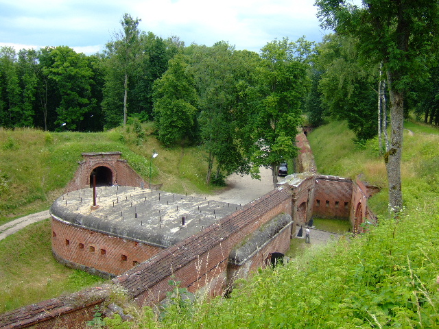 Giżycko (Lötzen) - Feste Boyen